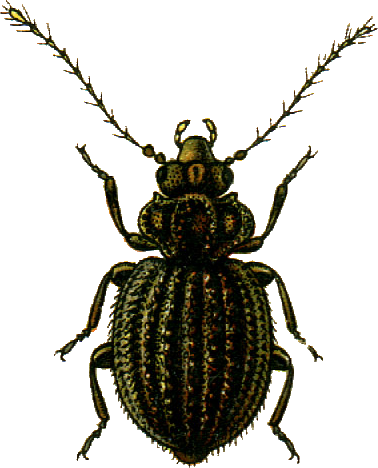 This file has been extracted from another file: Jacobs20.jpg